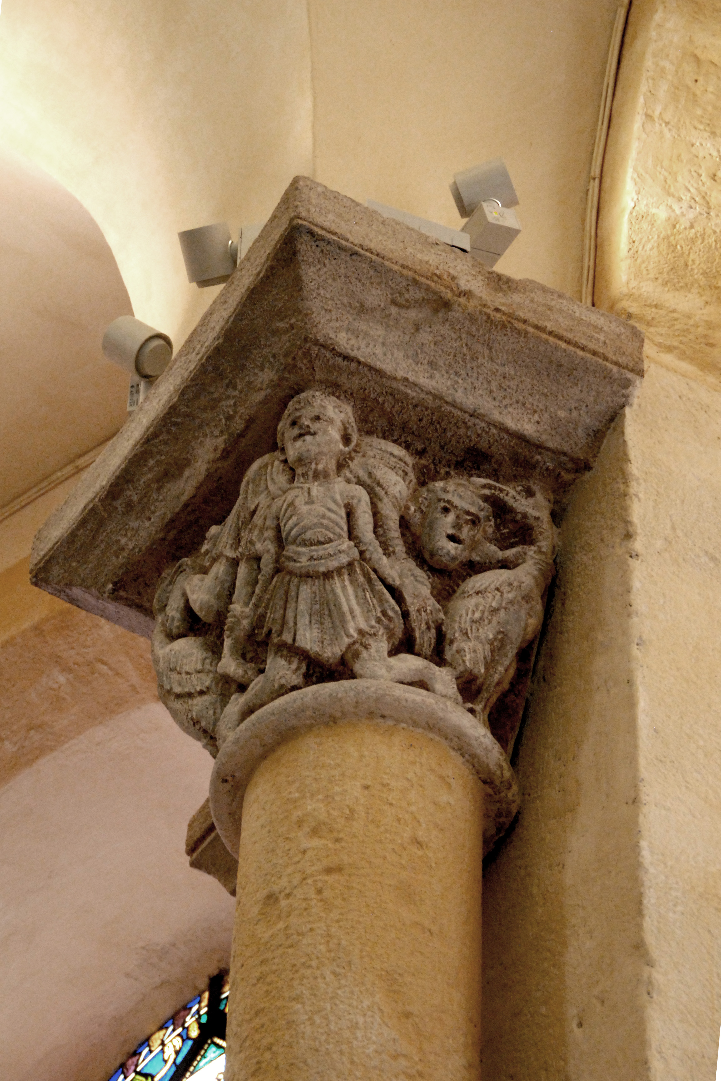 Notre-Dame du Port, Kapitell im Umgang, Mann trägt "Gänsedieb"